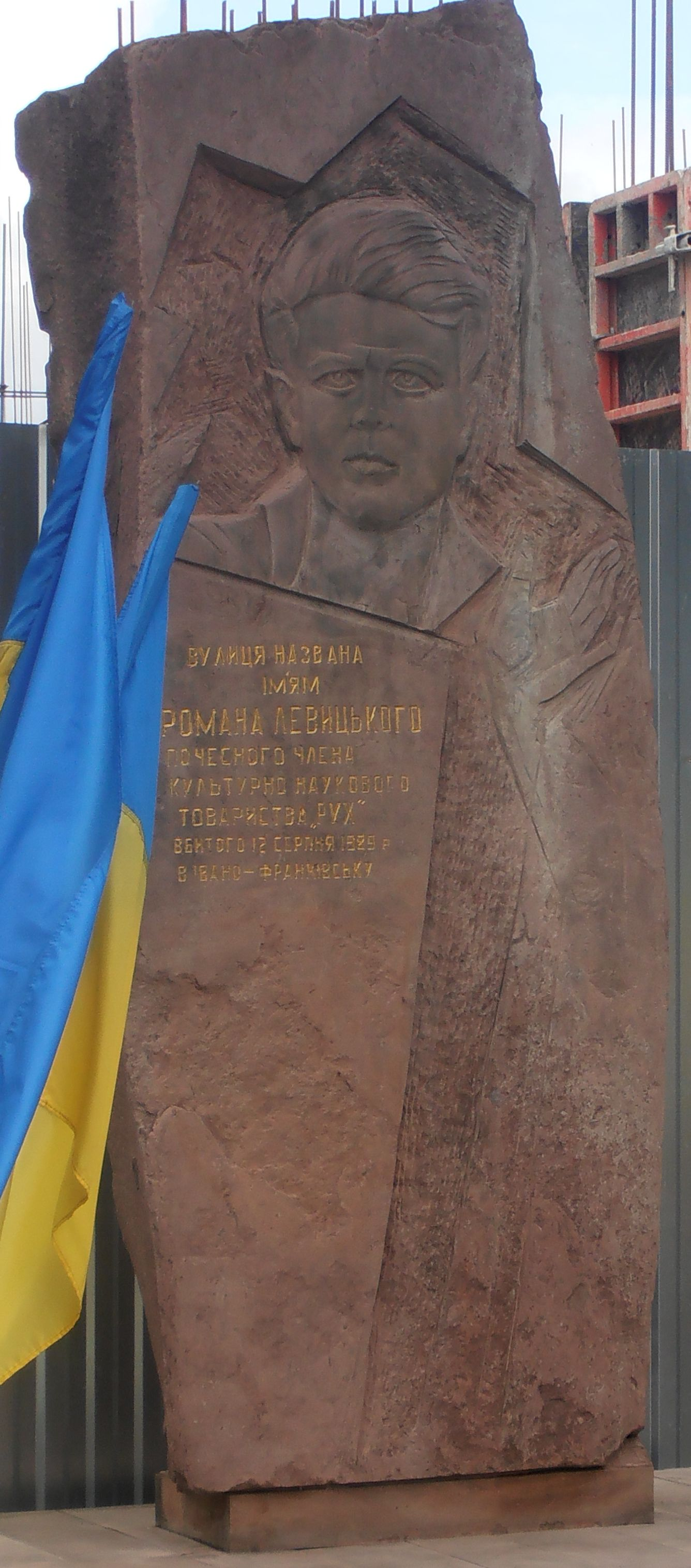 Монумент Роману Левицькому